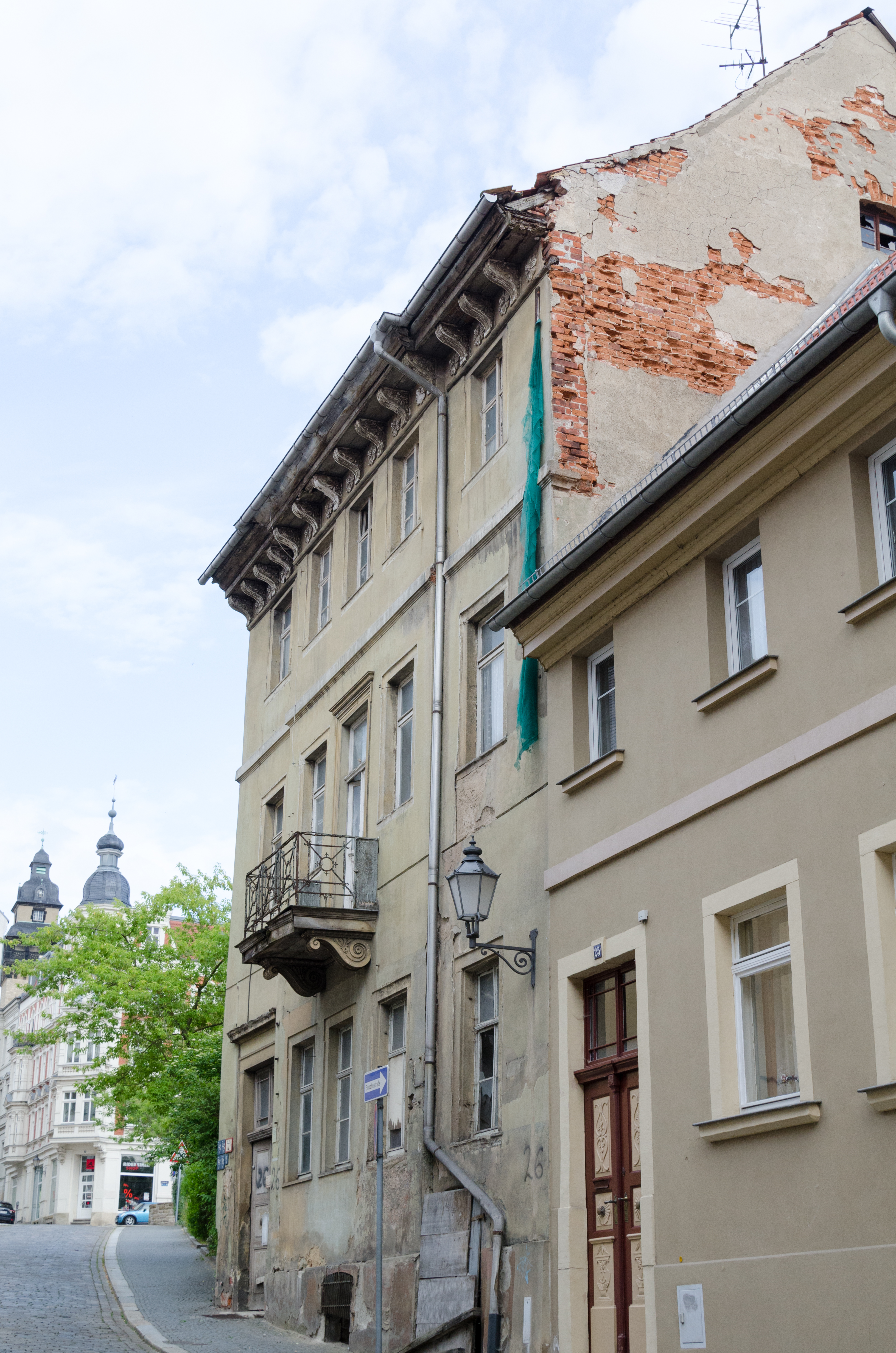 Zeitz, Messerschmiedestraße 26